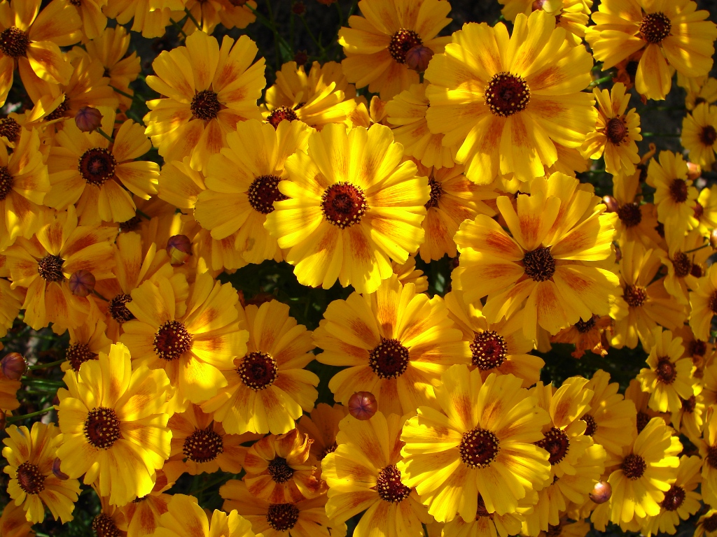 Coreopsis tinctoria (nachyłek barwierski) rodzina Asteraceae (astrowate)